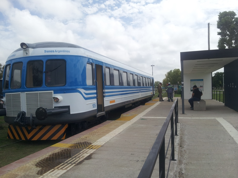 Un coche NOHAB del Tren Universitario de La Plata